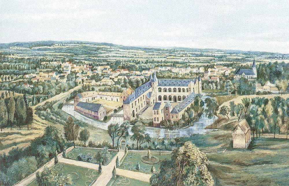 Burg und Herrlichkeit Odenkirchen von Nordwesten um 1680 /Source = Heimatverein Odenkirchen